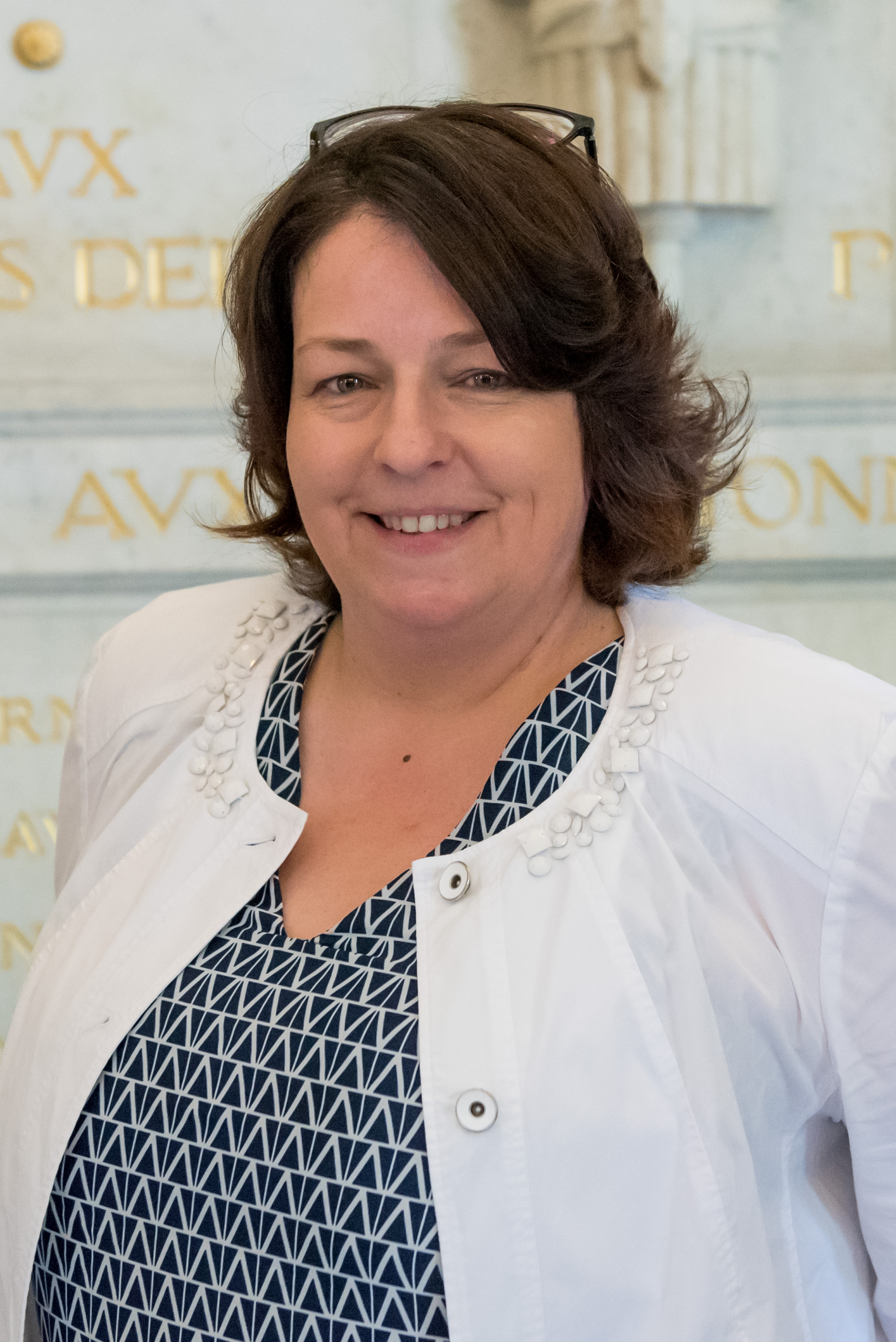 Sophie Errante dans la salle des Quatre colonnes du palais Bourbon en 2017.